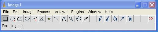 Barre flottante de menus de ImageJ